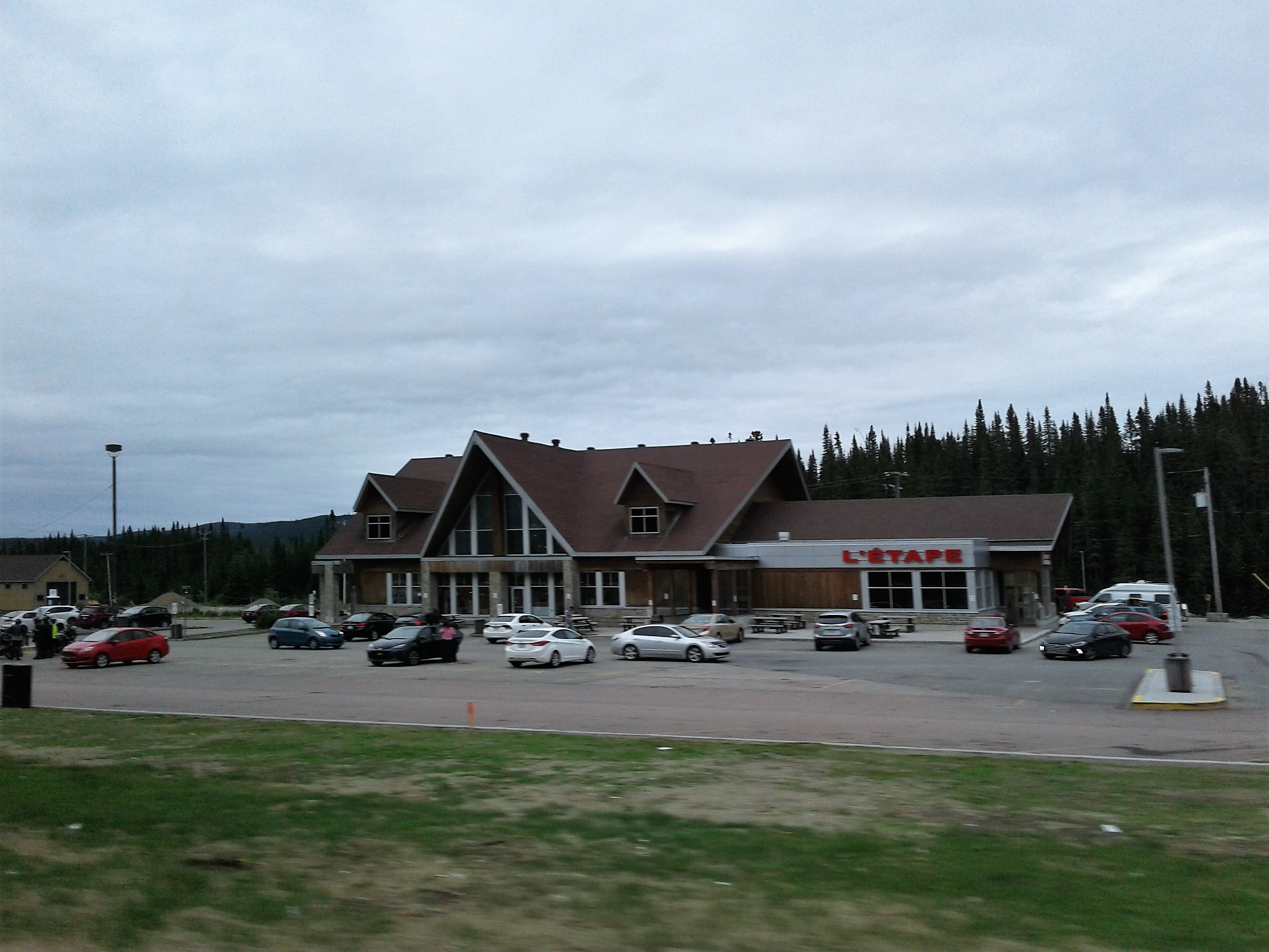 La halte routière L'Étape, dans la réserve faunique des Laurentiques